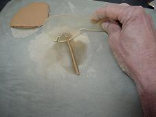 Ensaio de Limite de Plasticidade